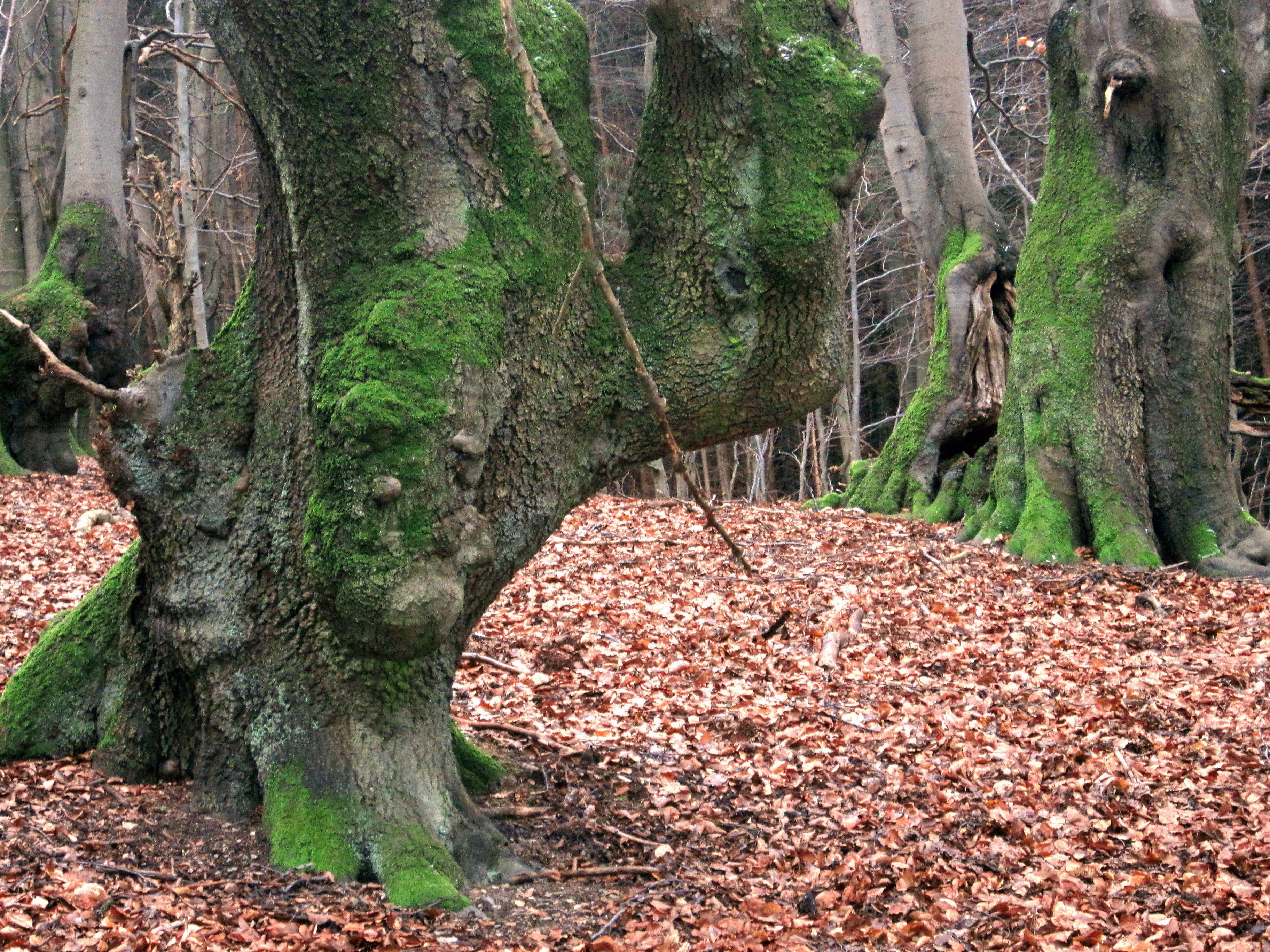 Rheingauer Gebück: Alte Gebückbäume (hier Rotbuchen) am Wolfsrück. Rheingau, Hessen.